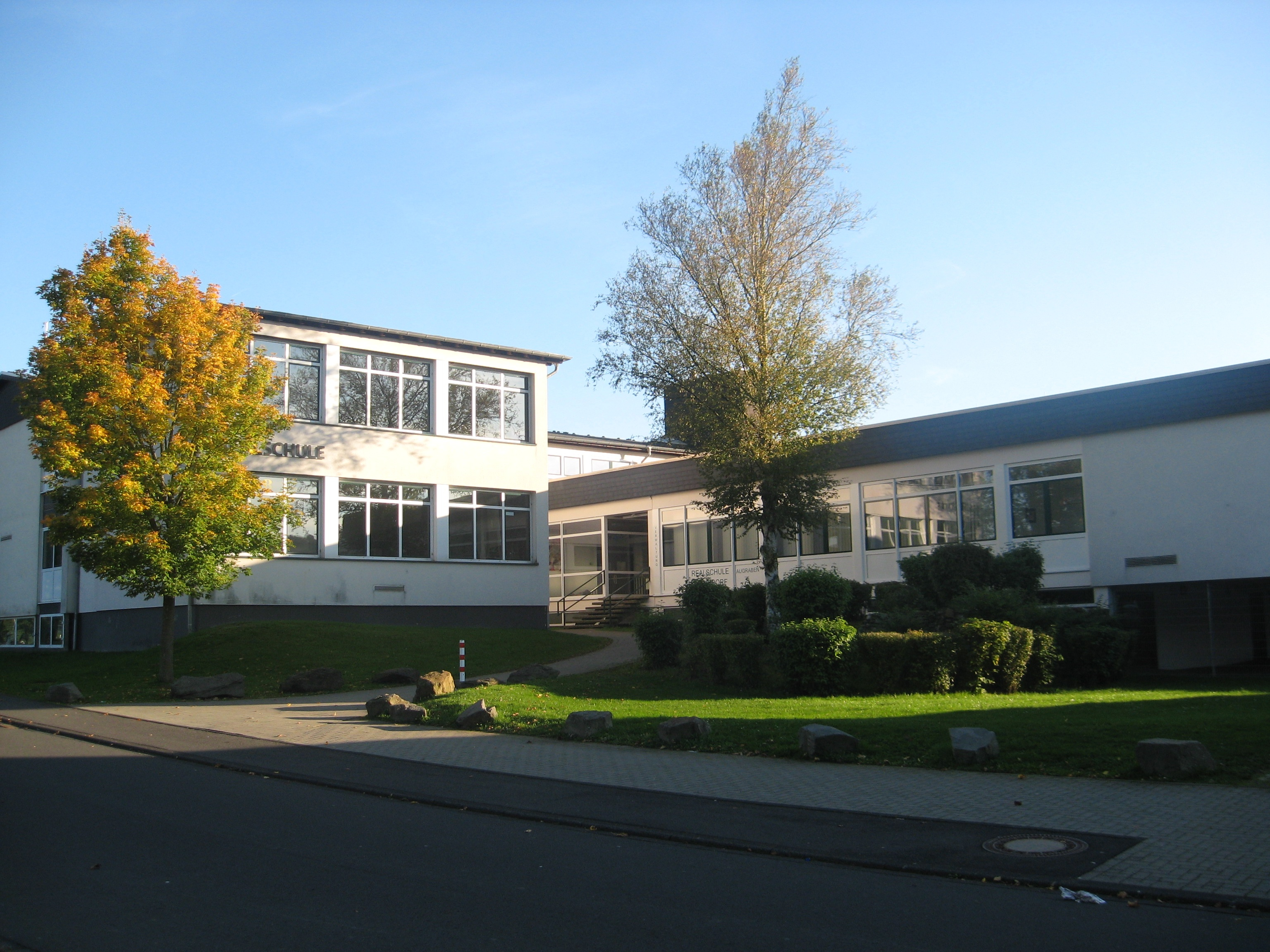 Die Wilnsdorfer Realschule in Niederdielfen, Haupteingang, vorne links Physik-, darüber Kunstraum, rechts des Eingangs die Verwaltung.